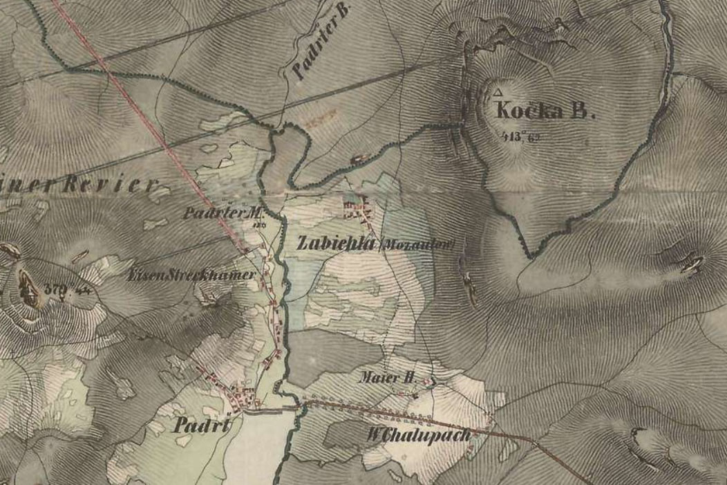 Zaběhla - 1. vojenské mapování